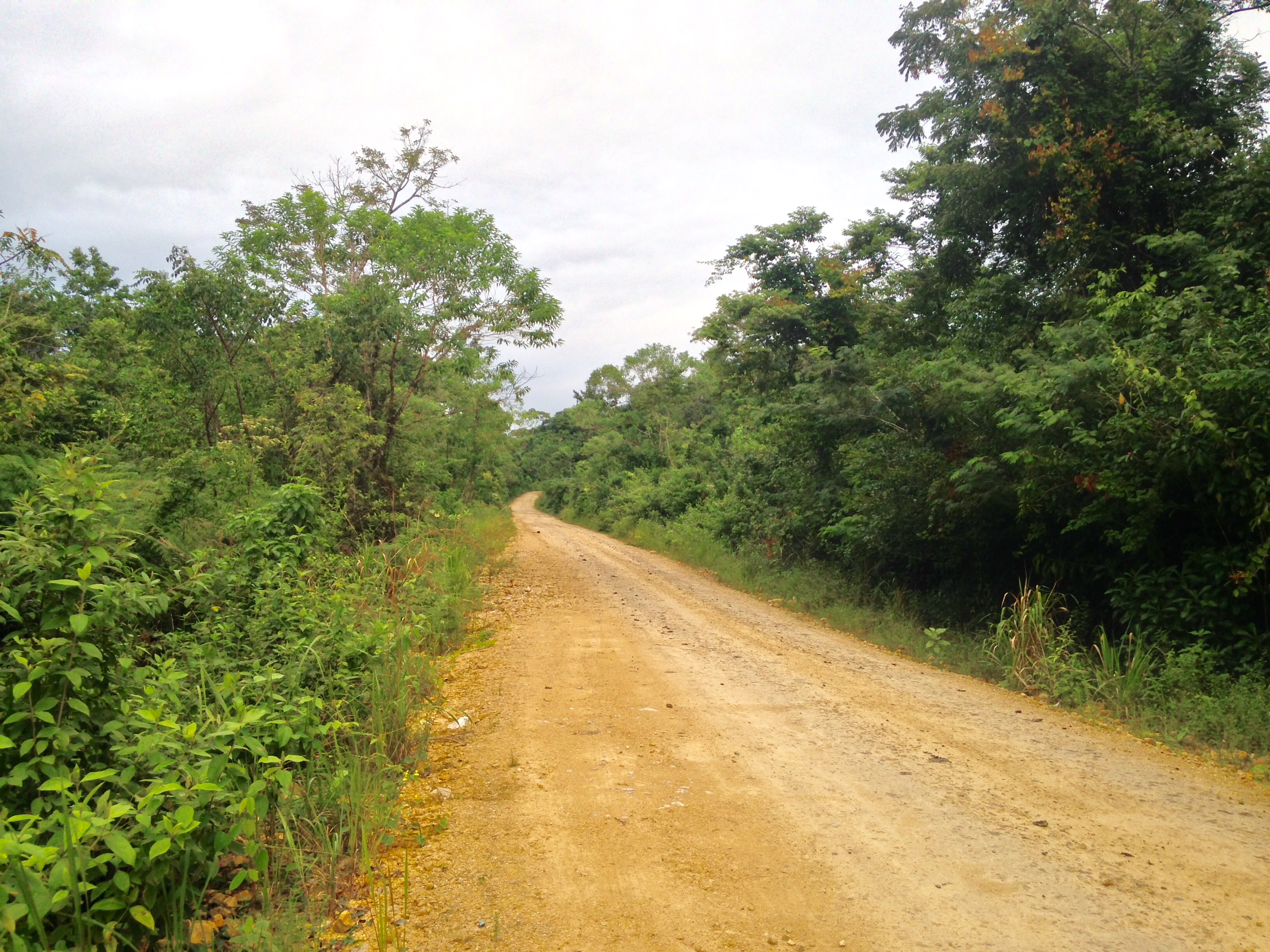 Camino rural en San Francisco, Petén, Guatemala. Diciembre de 2015